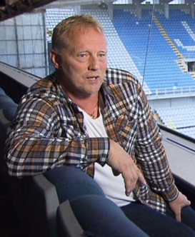 Arnór, junto a su hijo Eidur.